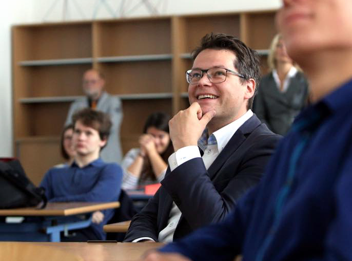 Schulbesuch des Wiener Stadtschulratspräsidenten Jürgen Czernohorszky am 13. September 2016